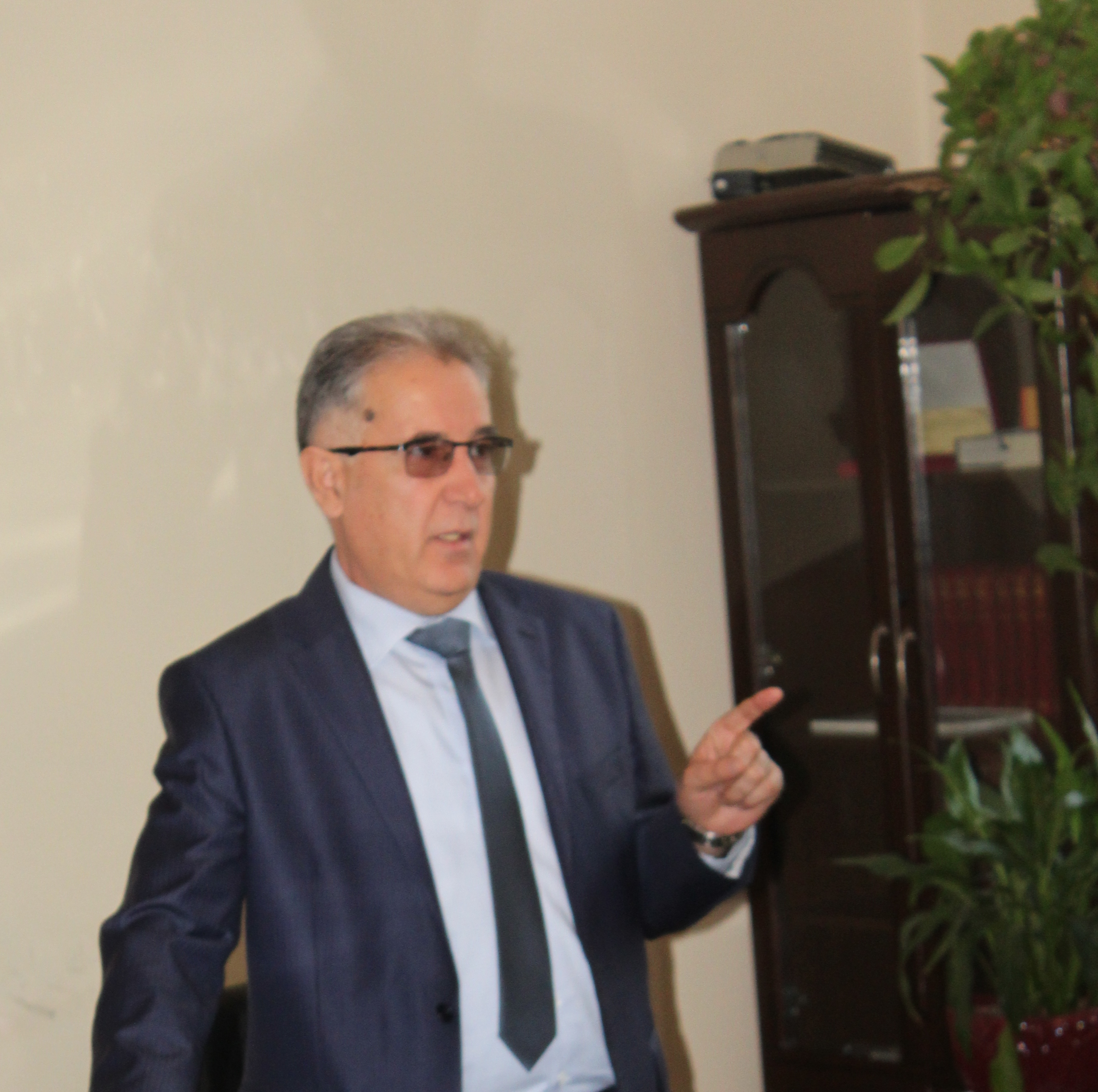 Салихов Нурали Назарович, доктор филологических наук, профессор. Ректор РТСУ. Таджикистан. Тоҷикӣ: Нуралӣ Назарович Cолеҳов, доктори илмҳои филология (2011), профессор (2013), доктори фахрии Донишгоҳи Қазоқистон (2012), Корманди фахрии маорифи Федератсияи Россия (2014).Ректори Донишгоҳи (Славянии) Россияву Тоҷикистон